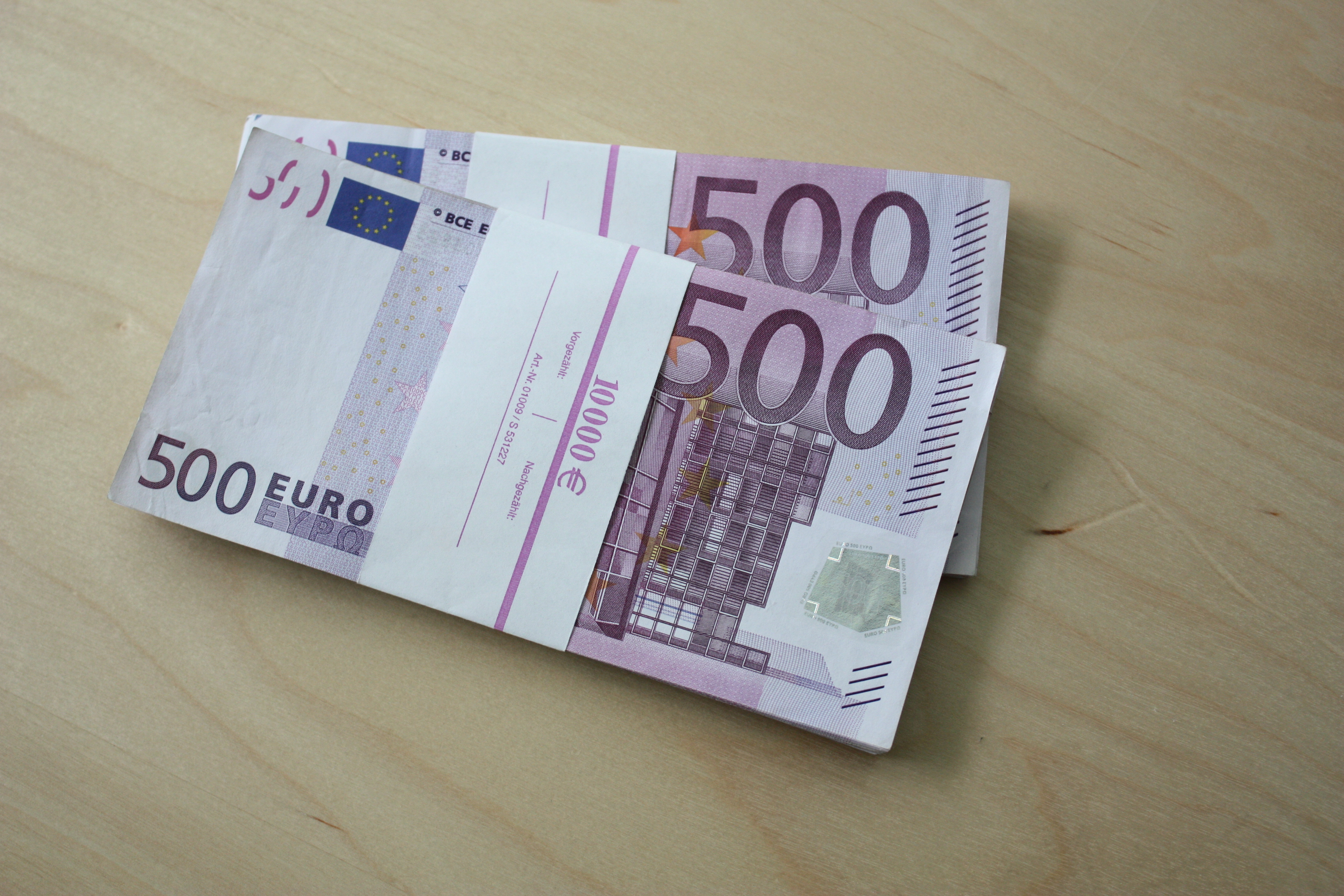 20.000 Euro in 500-Euro-Scheinen